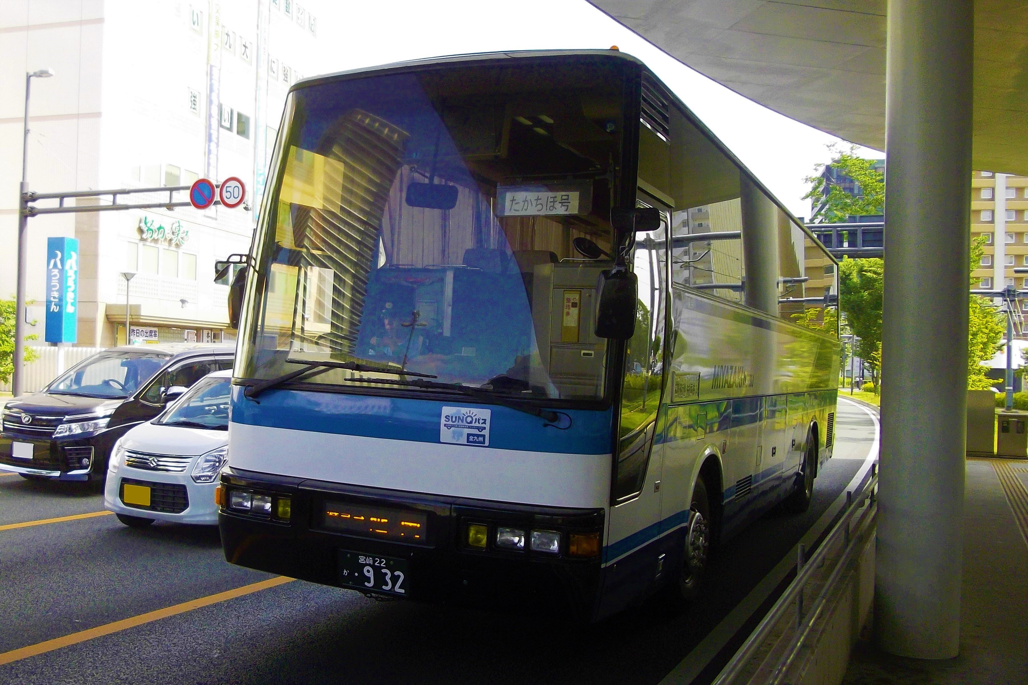 いすゞ・スーパークルーザー（U-LV771R）、宮崎交通で長距離路線用として使用される車両。熊本市西区・熊本駅前にて撮影